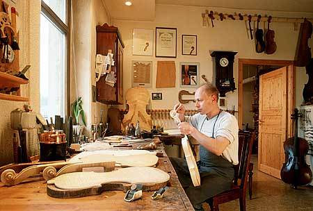 Geigenbaumeister Jörg Wunderlich in seiner Werkstatt in Markneukirchen